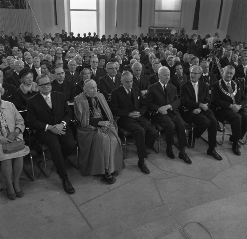 Verleihung des Friedenspreises des deutschen Buchhandels an (Augustin) Kardinal Bea u. (Willem A.) Visser't Hooft in der Paulskirche